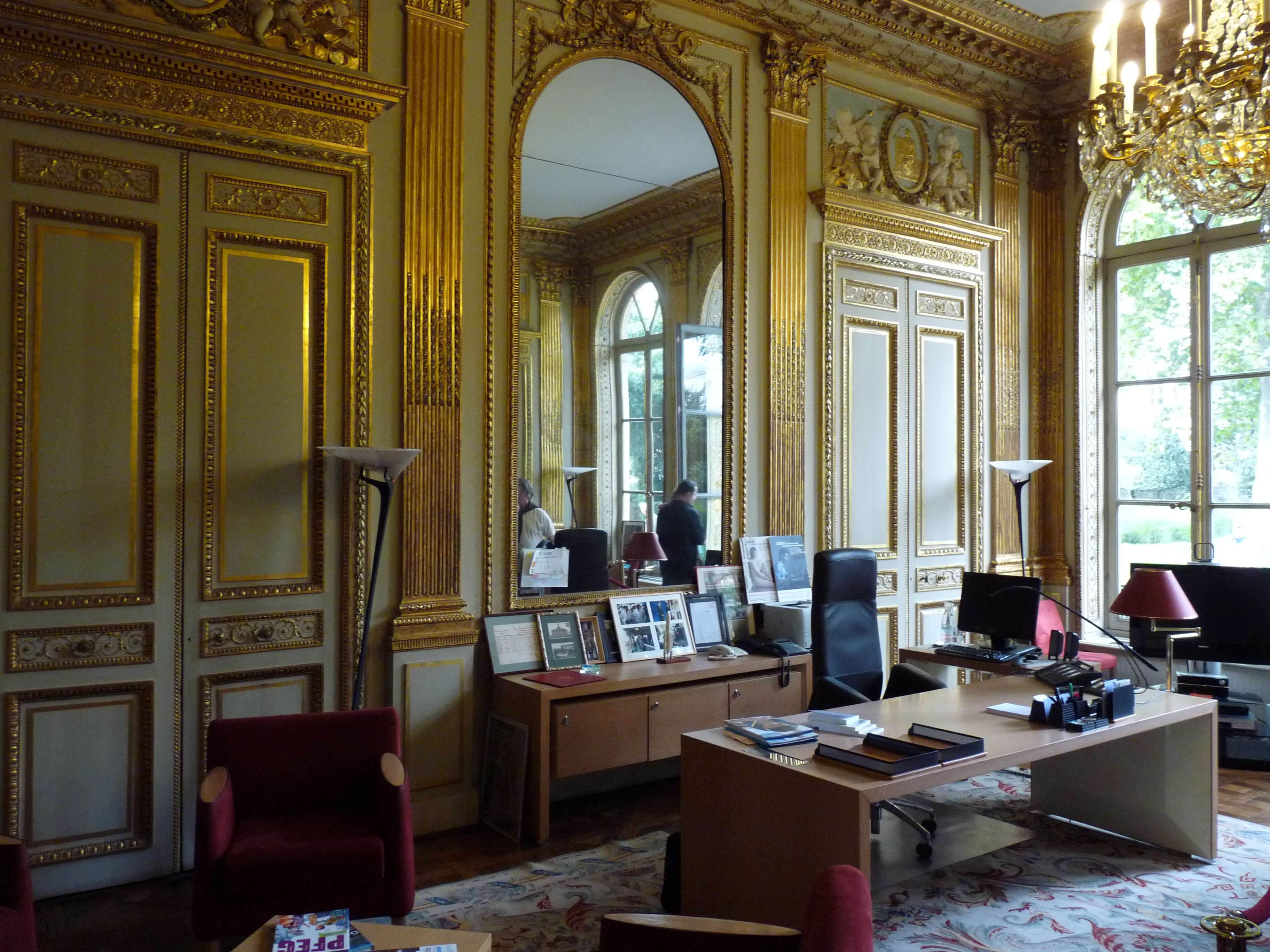 Le salon Jules Ferry à l'hôtel de Rochechouart à Paris, siège du ministère de l'éducation nationale. Photo prise lors des journées du patrimoine 2011. Il sert comme bureau du ministre. Lambris et 6 dessus de porte représentant des angelots autour d'un médaillon.